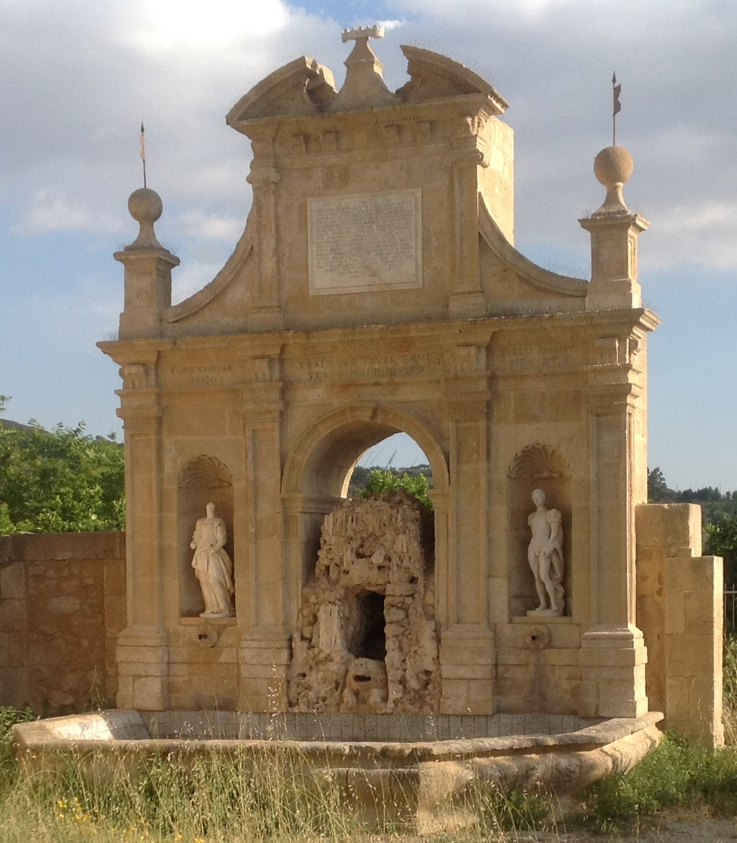 Fontana delle Ninfe This is a photo of a monument which is part of cultural heritage of Italy.